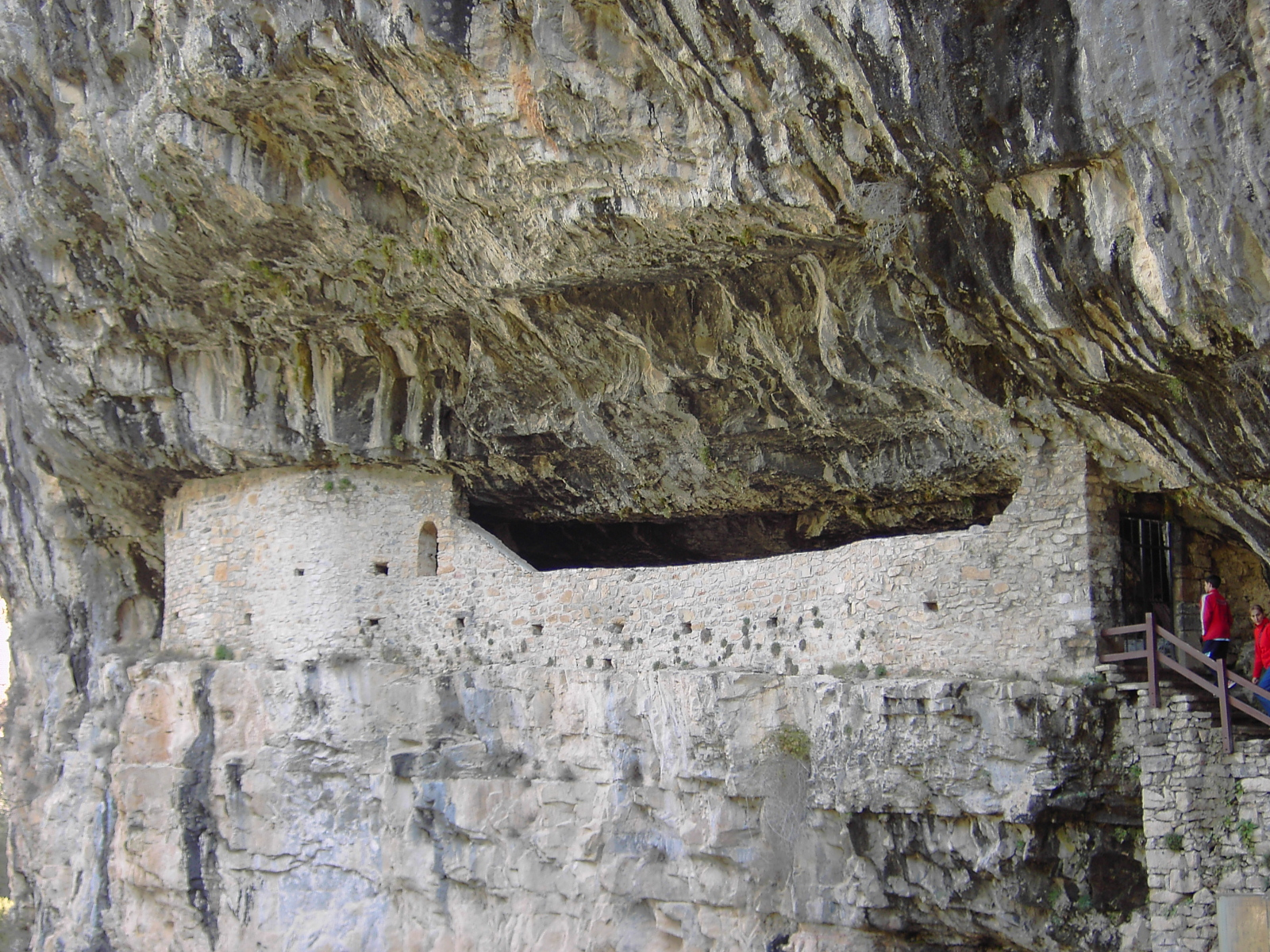 La Ermita de San Úrbez, o San Urbicio en castellano, está situada dentro del perímetro del Parque Nacional de Ordesa y Monte Perdido, y constituye un lugar de culto para todos los pueblos del Valle de Vió.